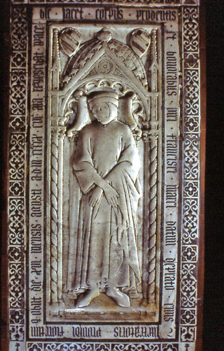 Niccolò di Piero Lamberti (1410)